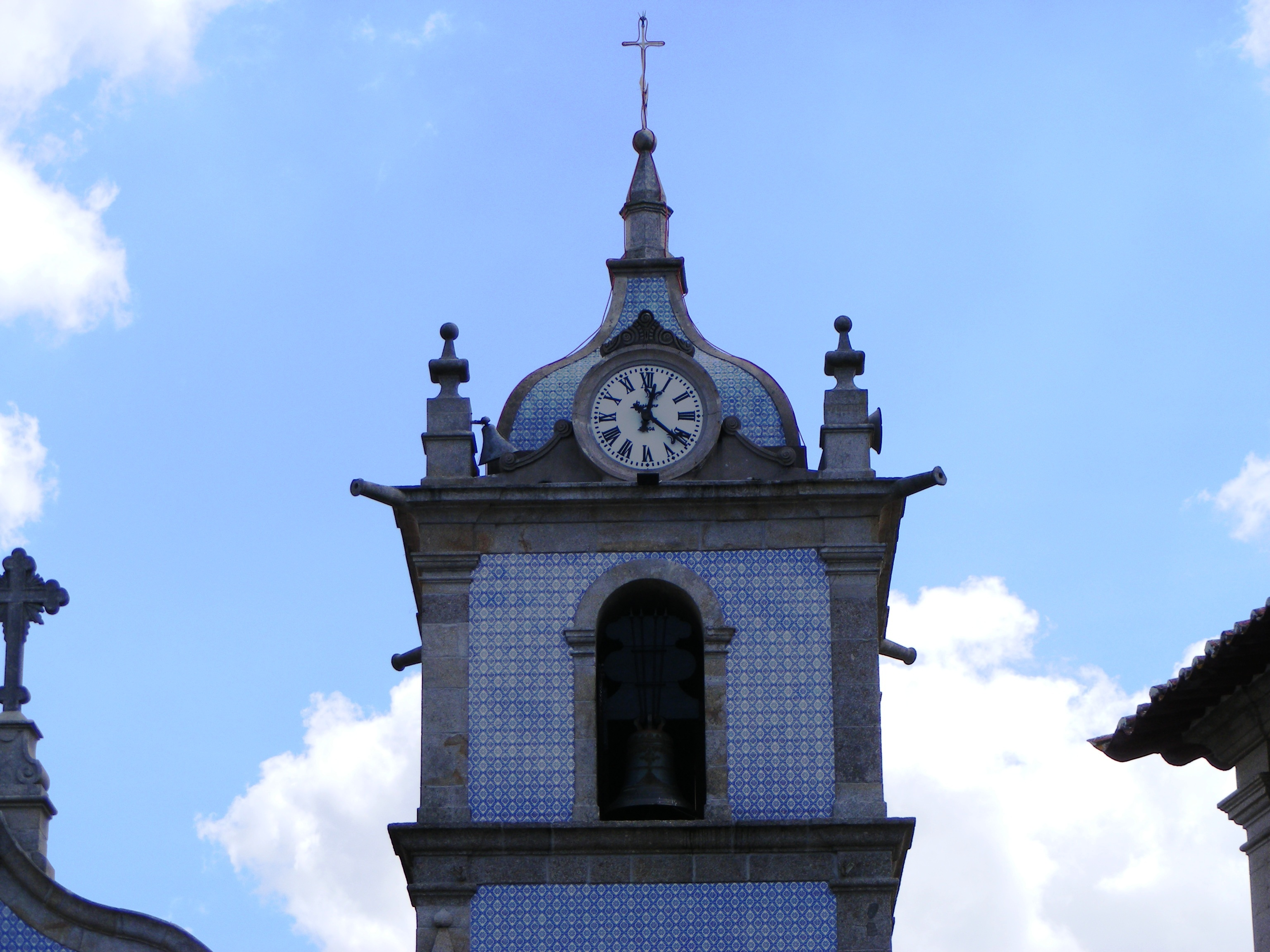 Igreja Matriz de Argoncilhe, aqui a sua torre sineira evidenciando a parte superior.